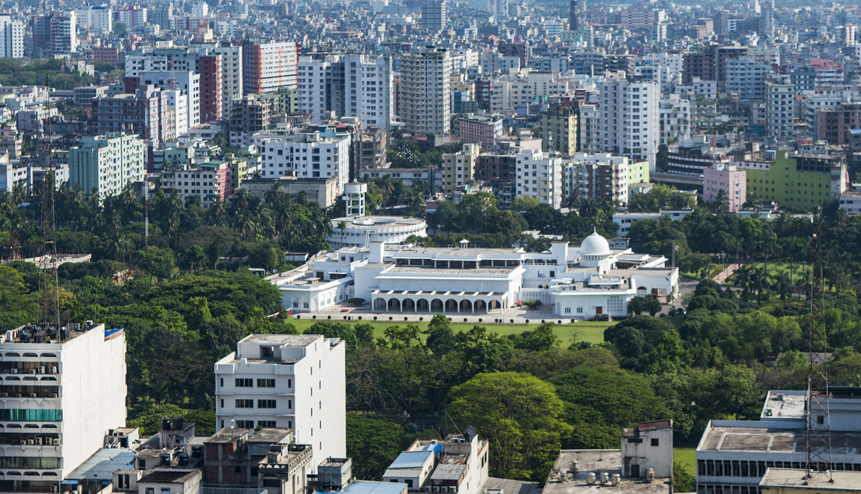 Dhaka